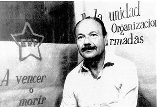 Salustro en Cautiverio, antes de ser asesinado por sus captores, el Ejército Revolucionario del Pueblo (ERP)